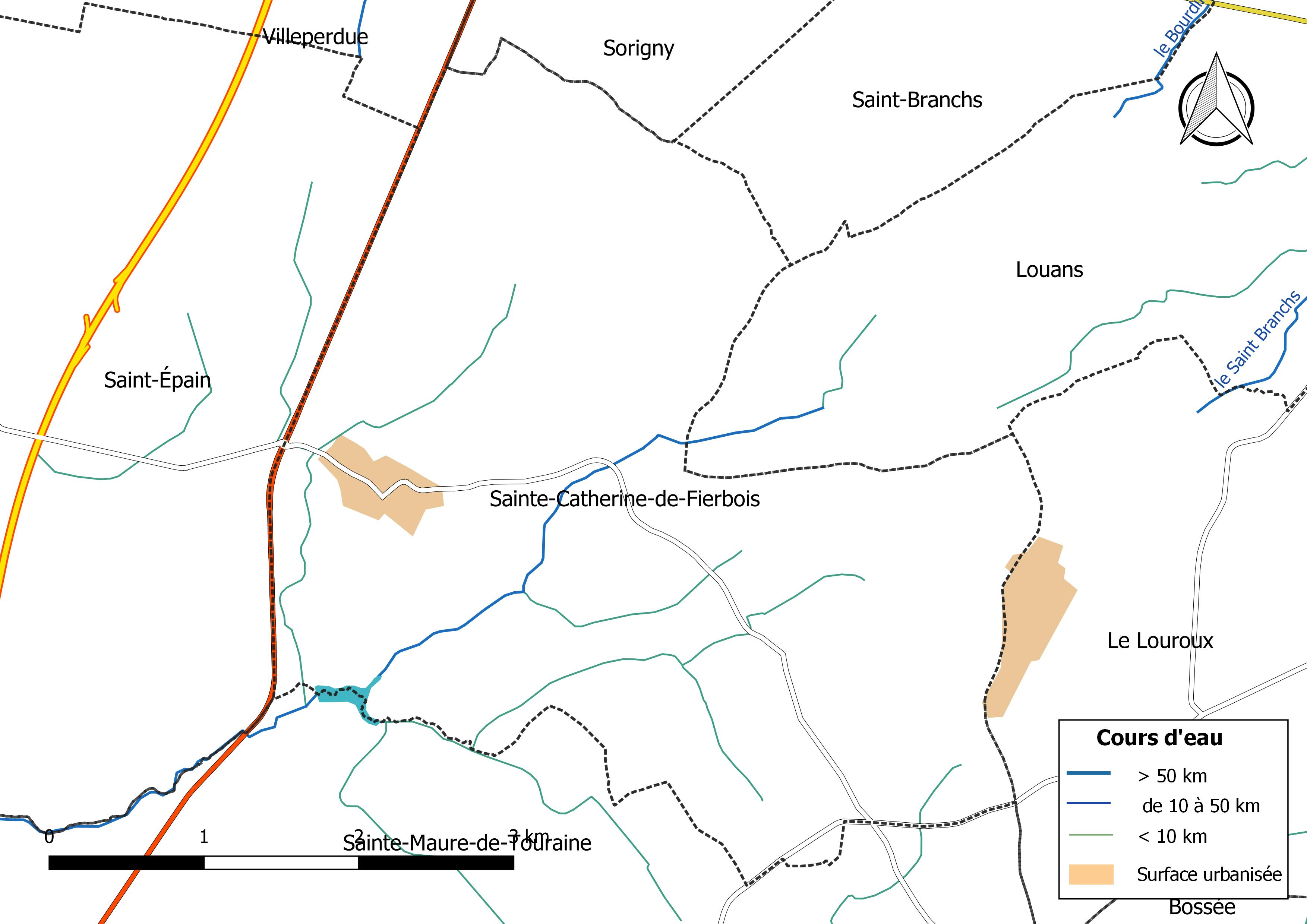 Carte du réseau hydrographique de la commune de Sainte-Catherine-de-Fierbois (France).